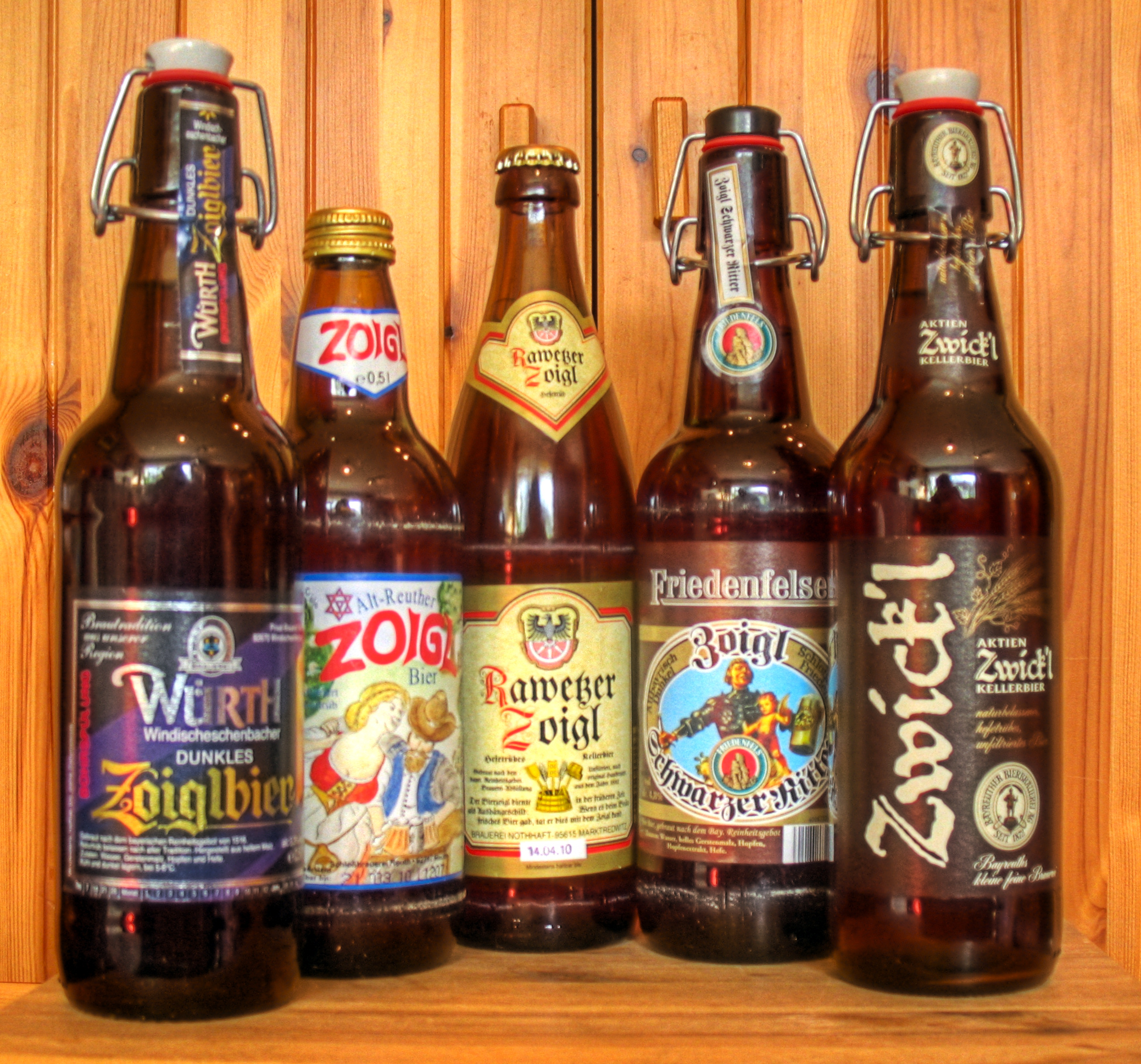 "Zoigl"-Biere von verschiedenen fränkischen und oberpfälzischen Brauereien